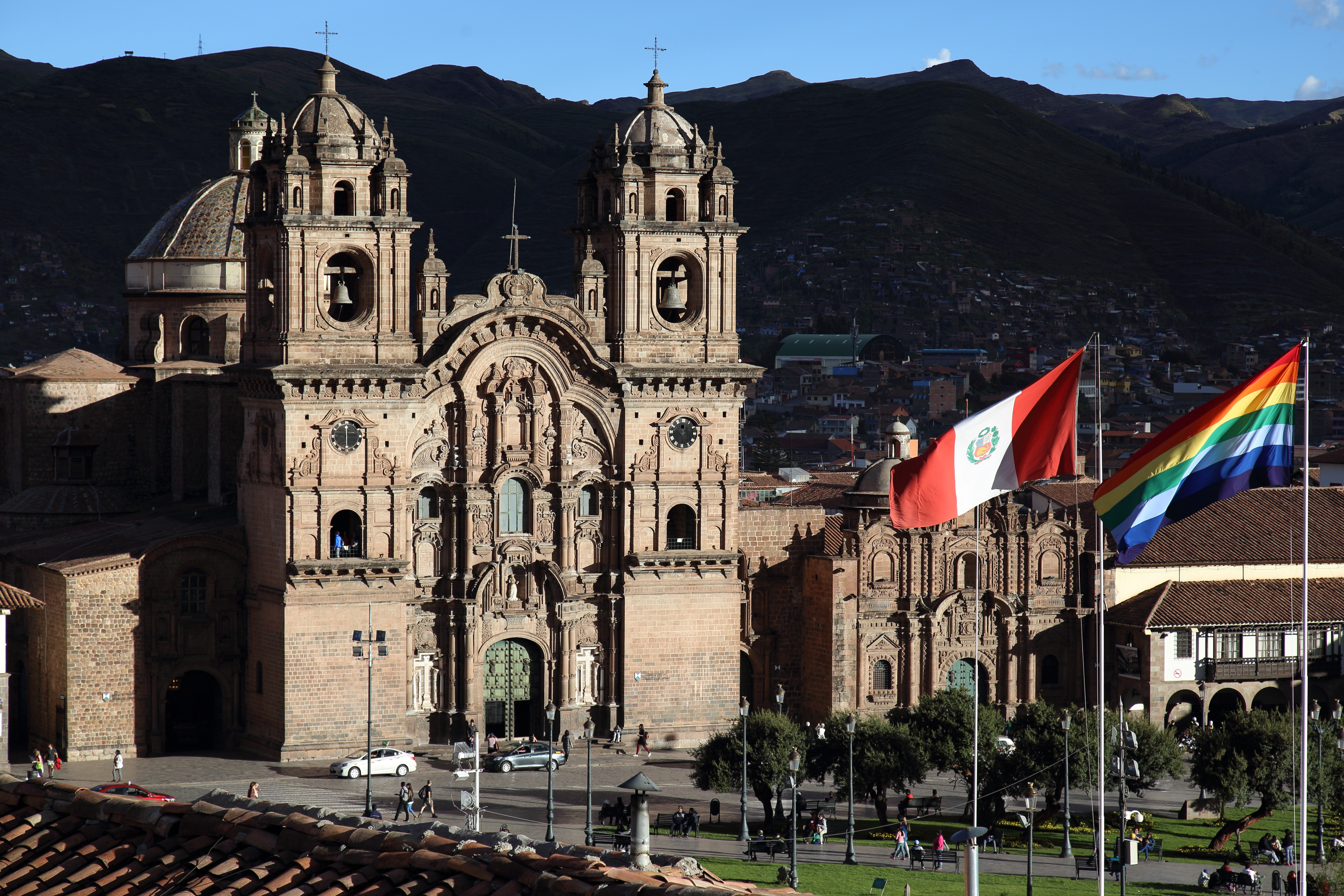 Banderas de Peru y Cusco